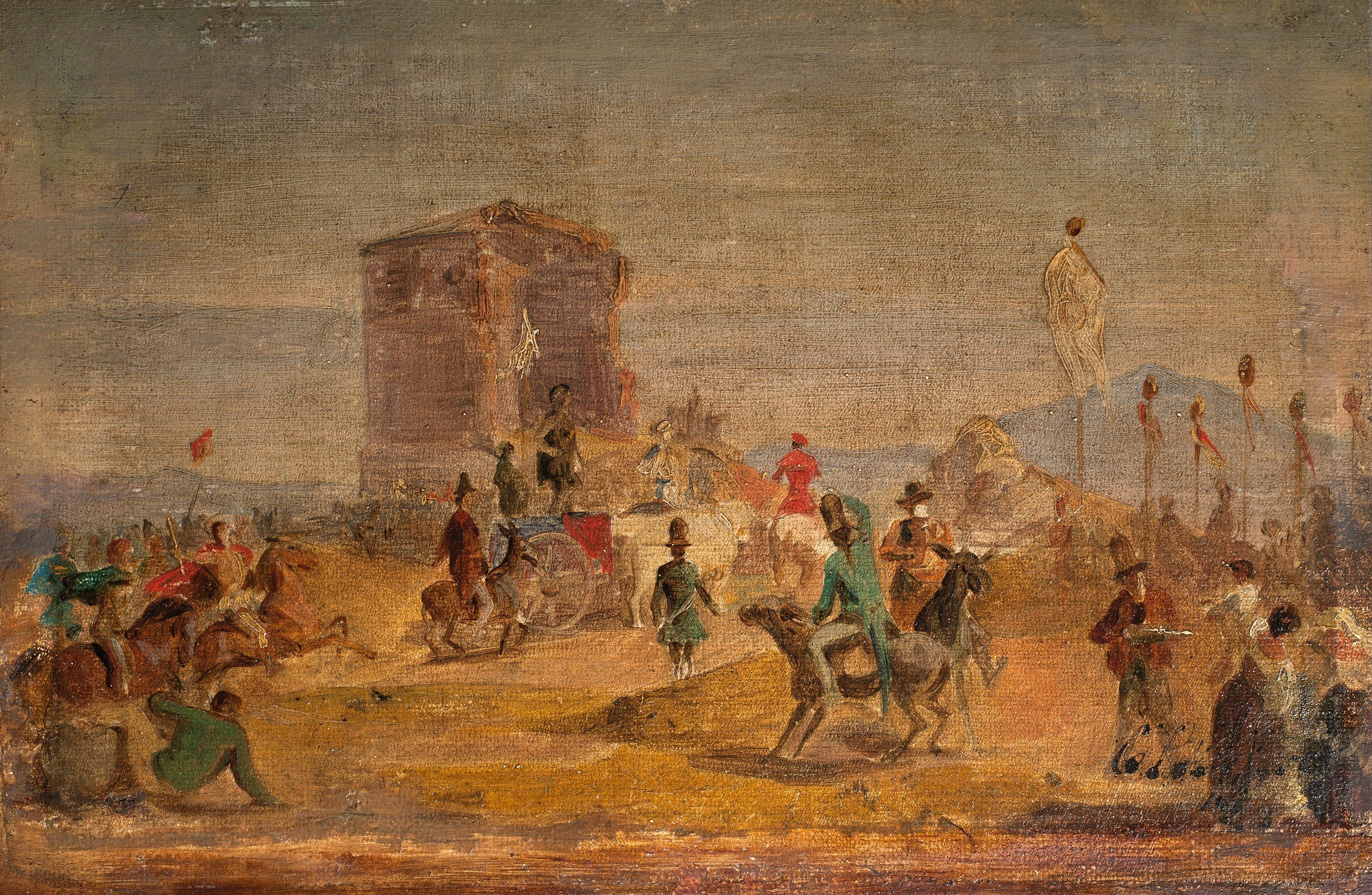 Künstlerfest bei den Cervara-Grotten bei Rom, das die deutschen Künstler der Ponte-Molle-Gesellschaft jährlich veranstalteten.